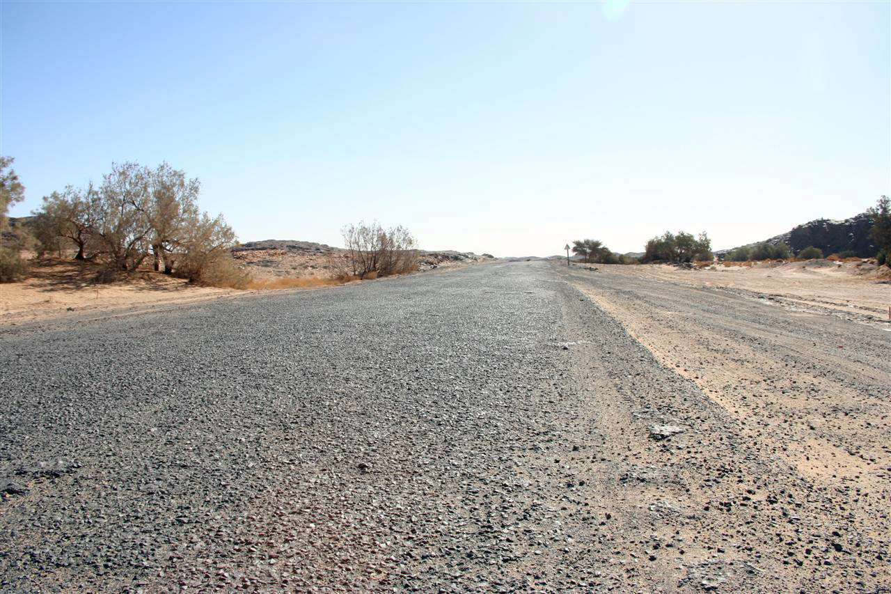 Une section de la route transsaharienne entre In Salah et Tamanrasset. Photo prise par mes soins en janvier 2009, libre de droits.